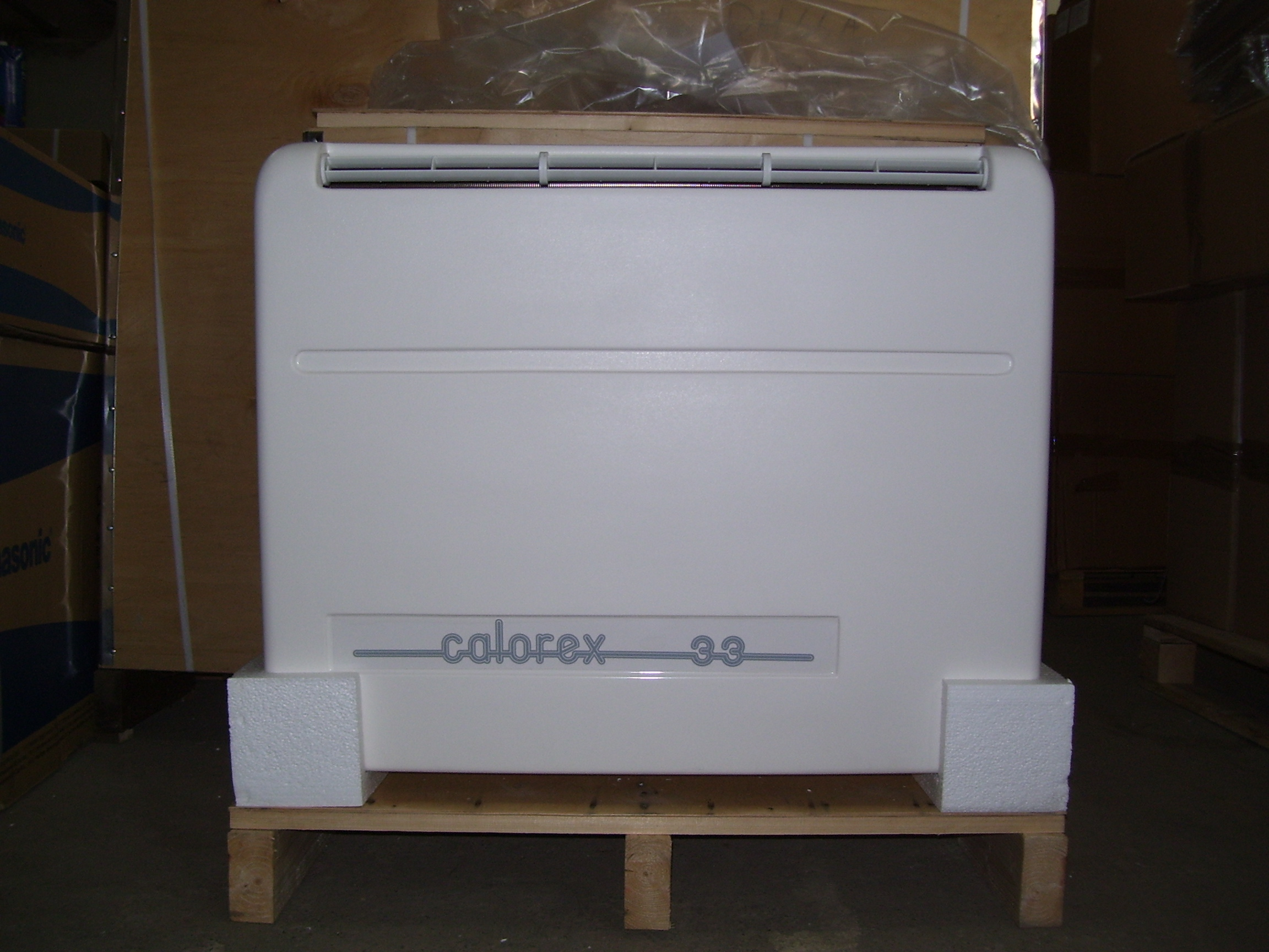 Calorex DH33A